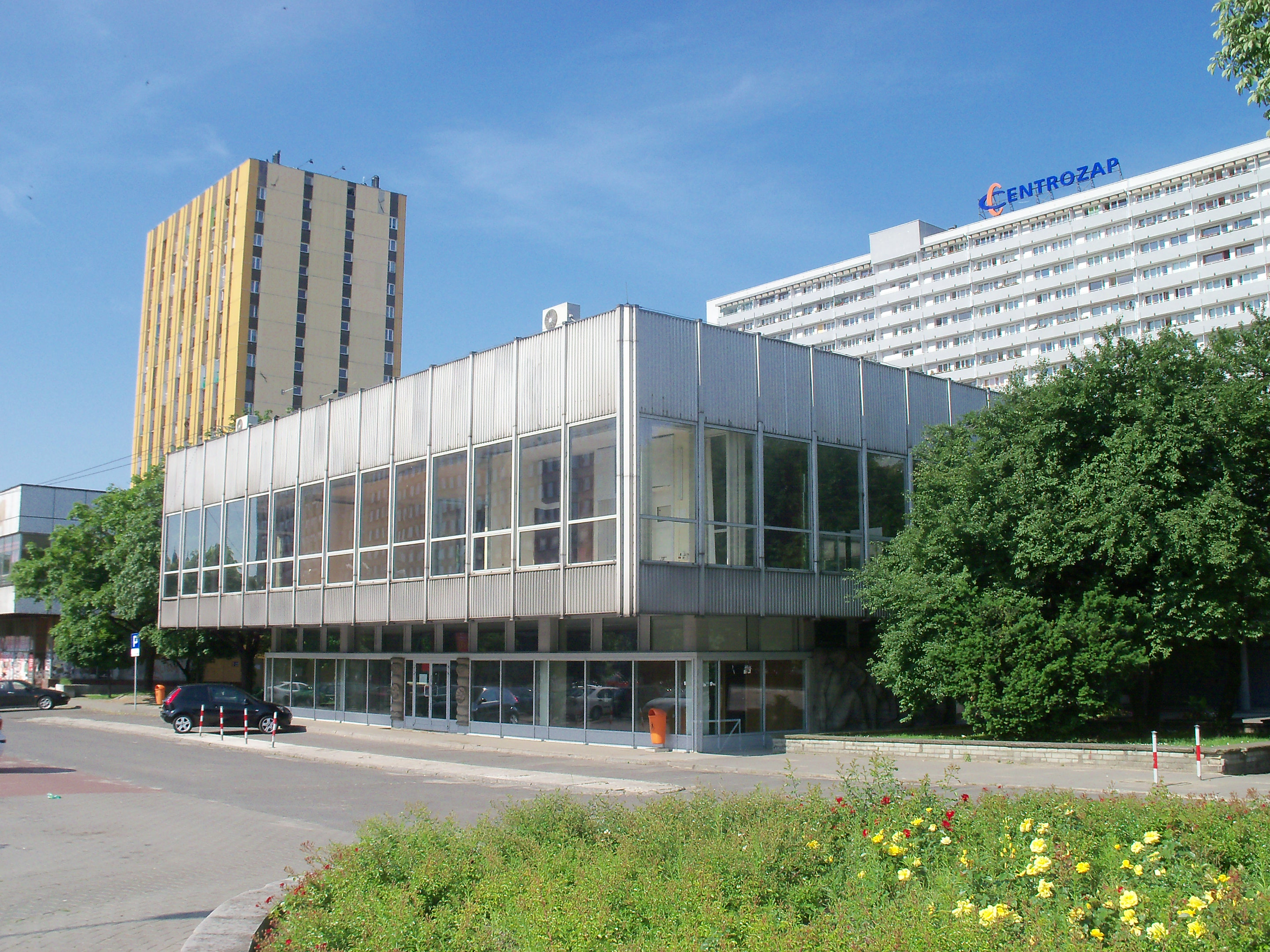 Budynek Pałacu Ślubów przy alei Korfantego w Katowicach